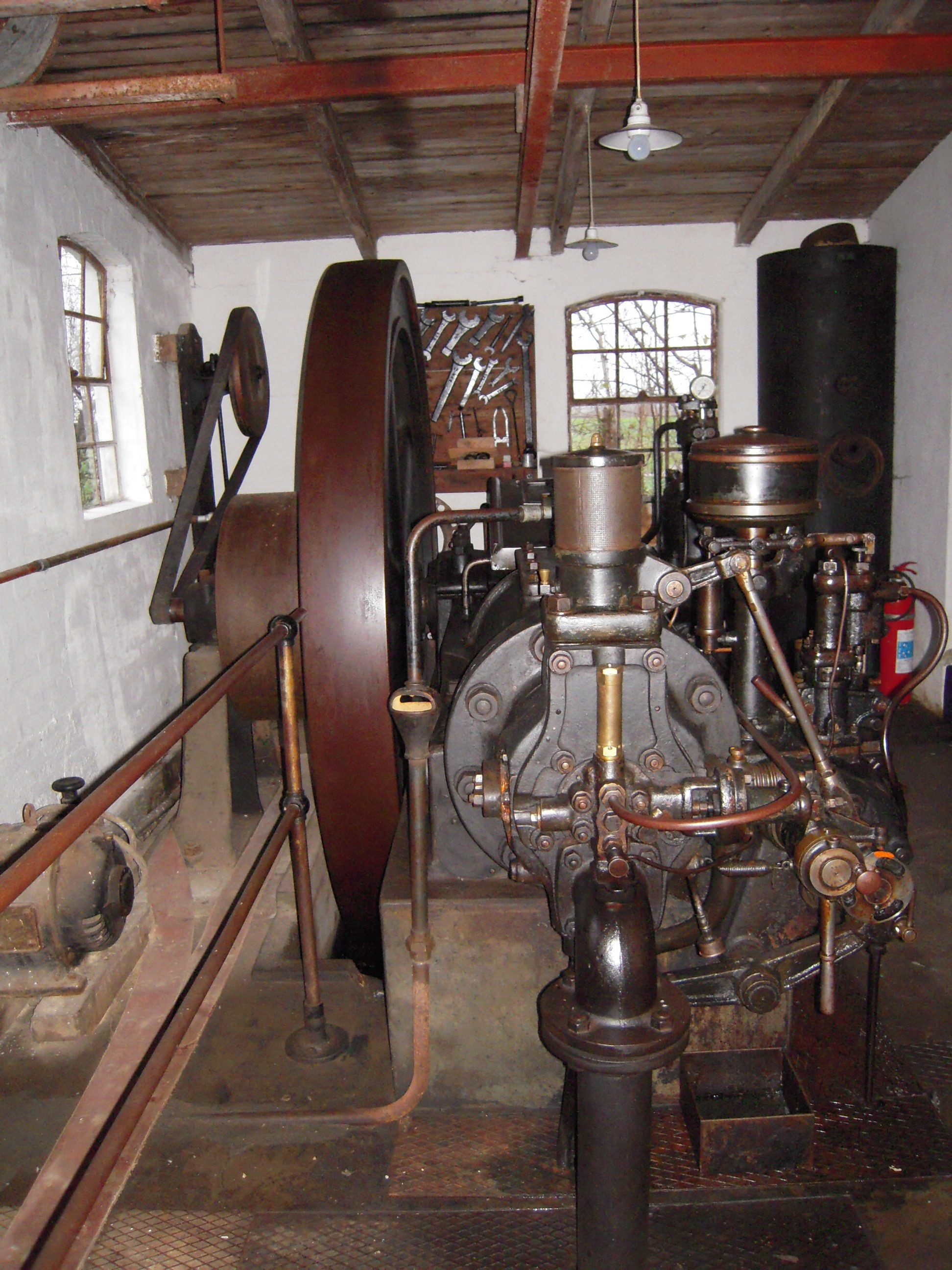 dieselmotoren i Sillerup Mølle ved haderslev